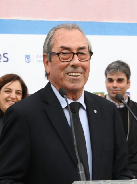 El concejal del distrito de Centro y delegado de Economía y Hacienda, Jorge García Castaño; el delegado de Coordinación Territorial y Cooperación Público-Social, Nacho Murgui; y la delegada de Políticas de Género y Diversidad, Celia Mayer, acompañados por el presidente de la Fundación Atlético de Madrid, Adelardo Rodríguez, y el presidente del club de fútbol base Dragones de Lavapiés, Jorge Bolaños, han presentado esta tarde el convenio de colaboración para el ‘Deporte inclusivo en Lavapiés’ en el Espacio Polivalente para Actividades Ciudadanas Embajadores, 18.